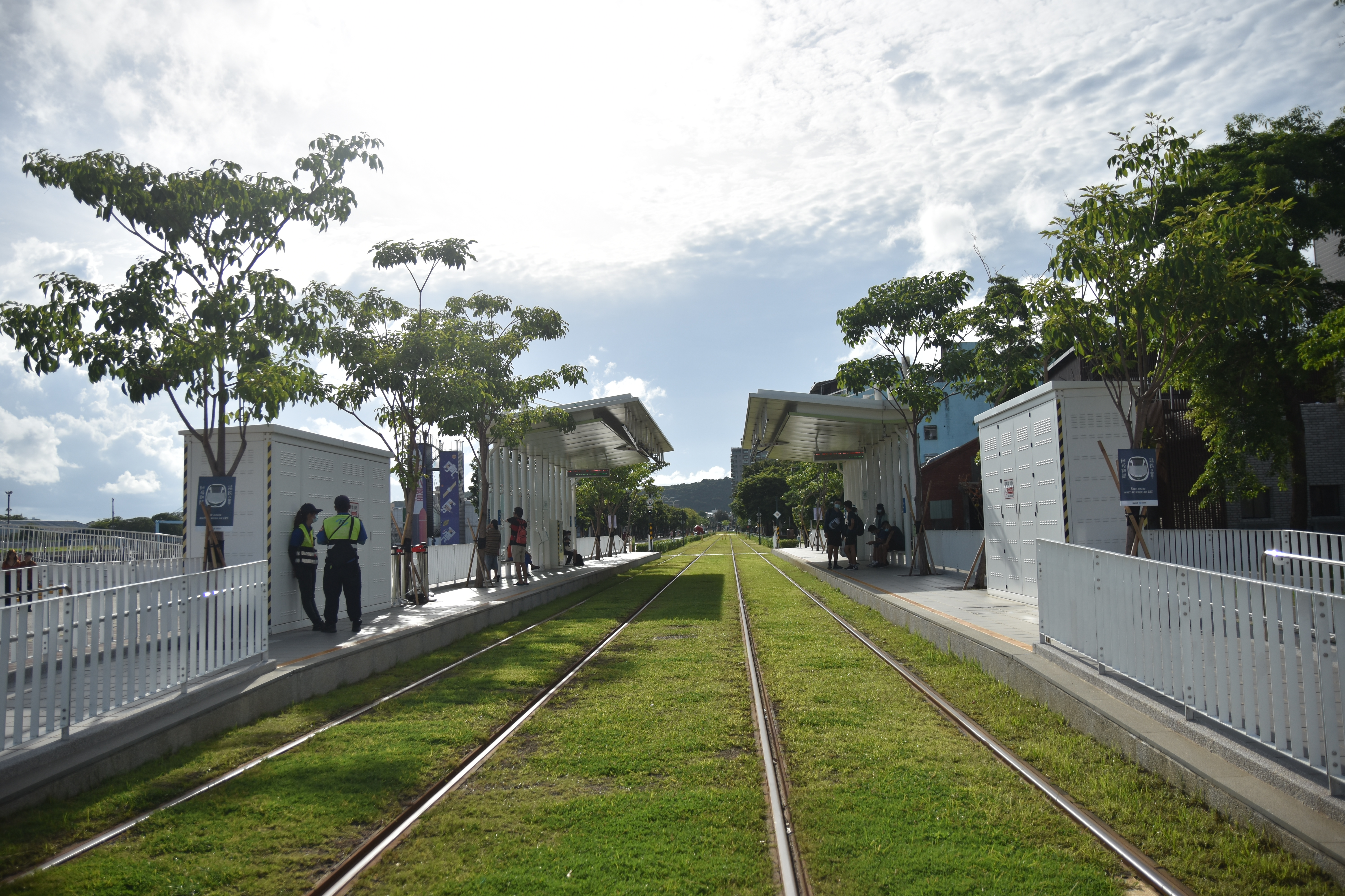 中文（台灣）: 駁二大義站